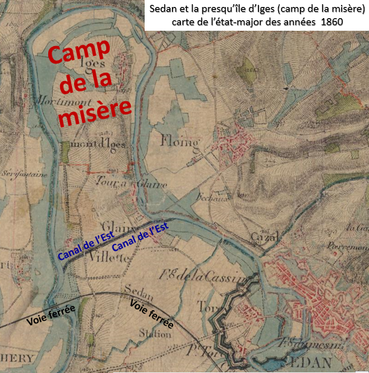 Sedan et l'emplacement du camp de la misère après la reddition de Sedan